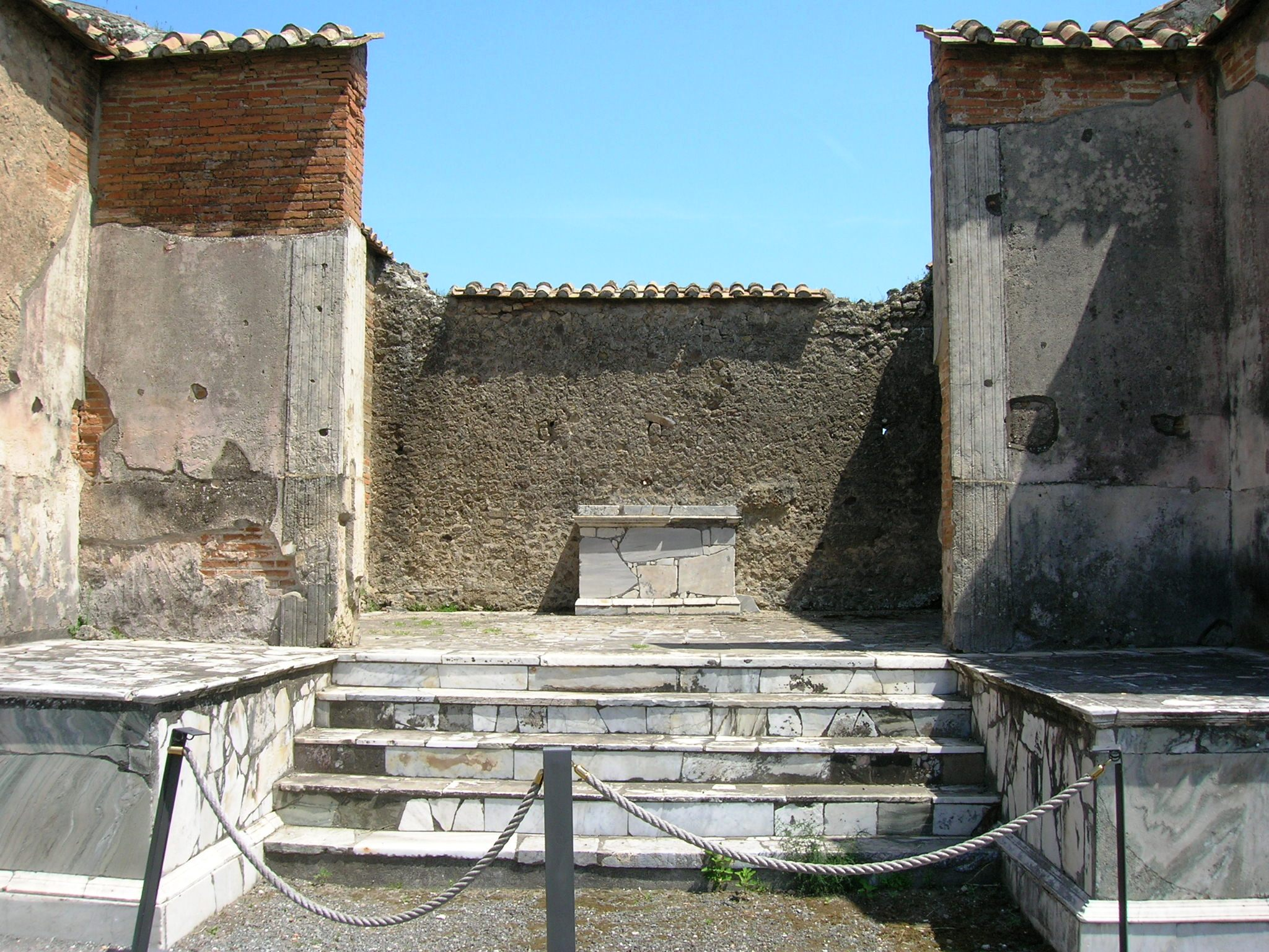 Il Macellum